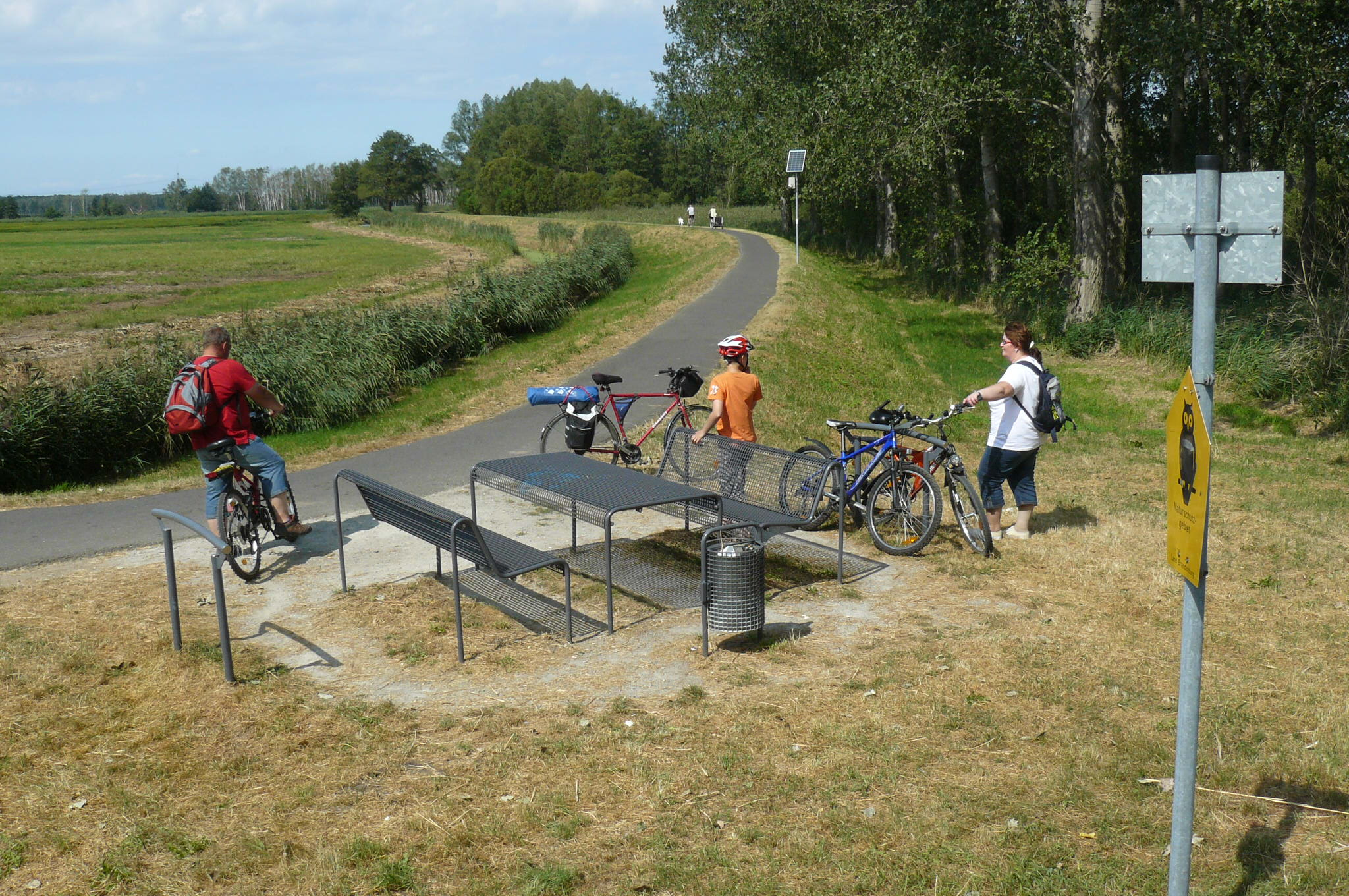 Gurkenradweg. Szlak ogórkowy, Spreewald.